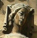 Eleonora Kastilská